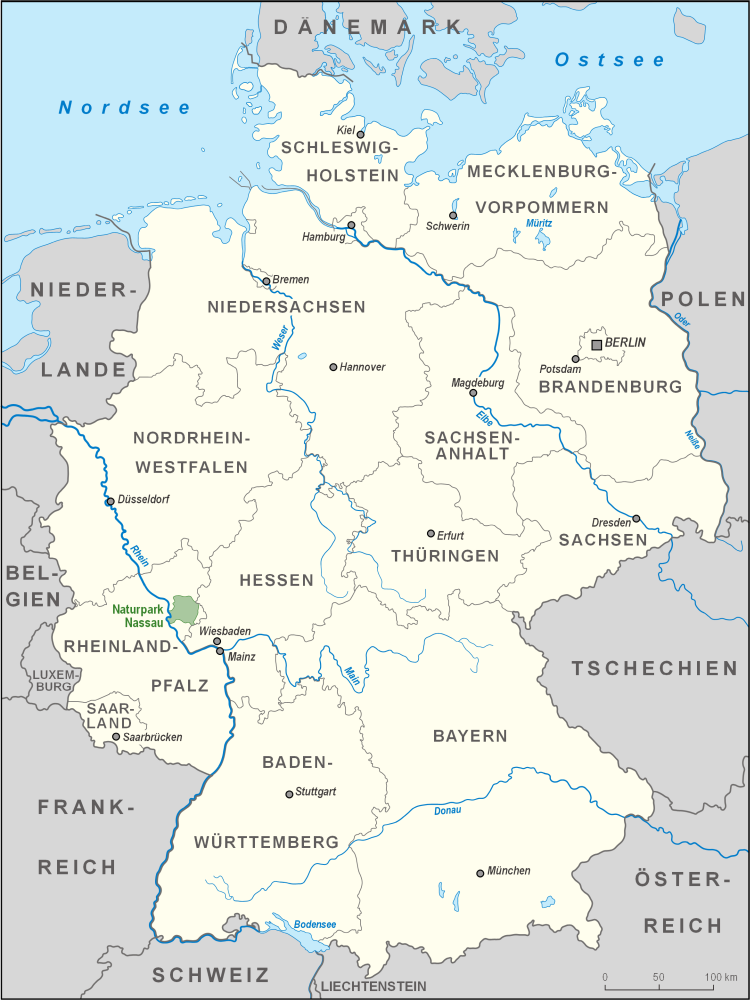 Karte des Naturpark Nassau in Deutschland